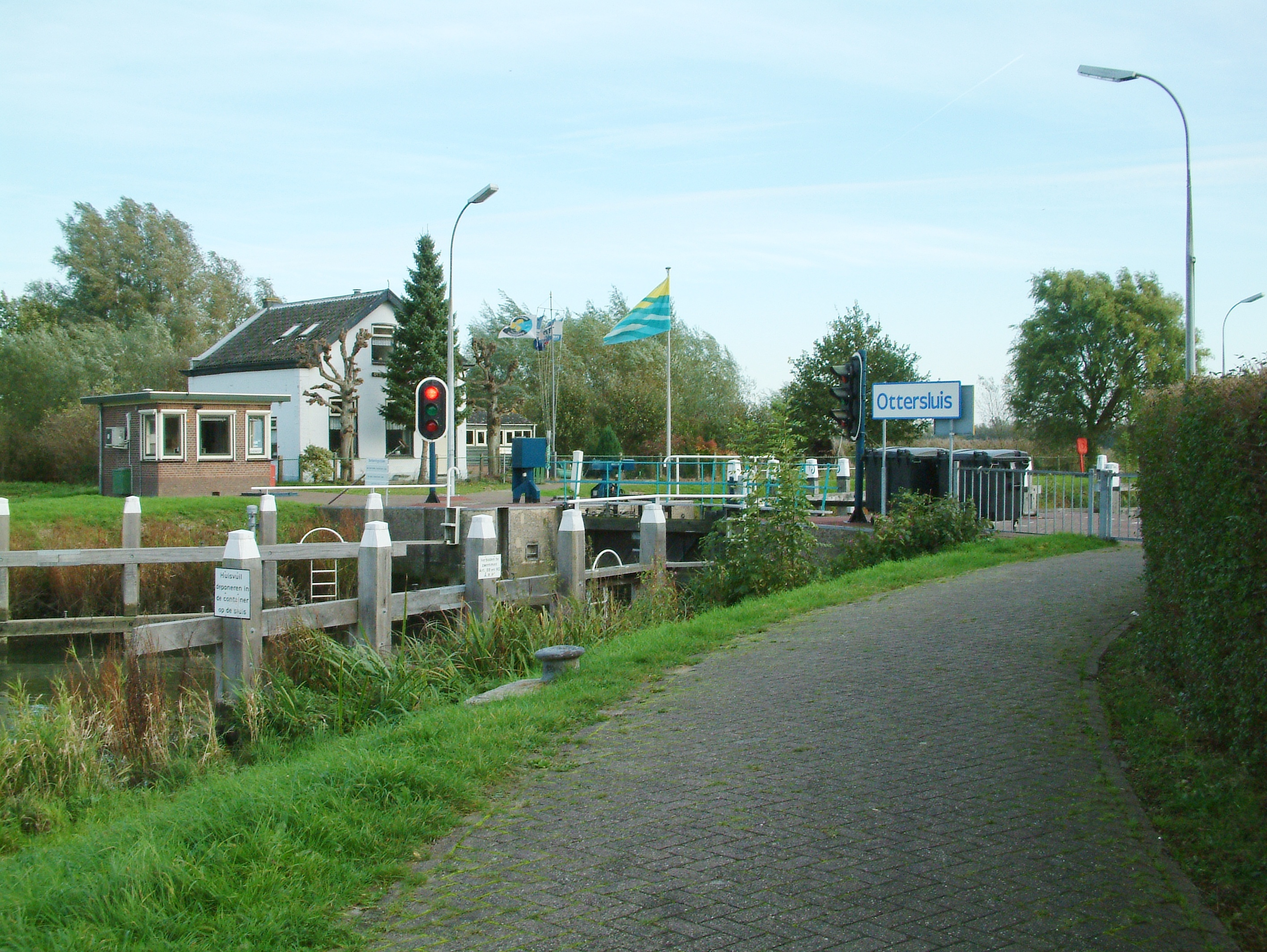 Ottersluis tussen de Beneden Merwede en de Kikvorschkil